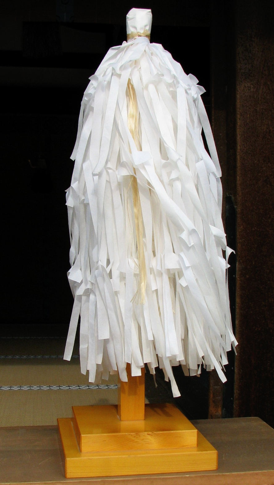 Ōnusa at Sumiyoshi Taisha, Osaka, Japan 大麻（大阪府大阪市 住吉大社にて撮影）